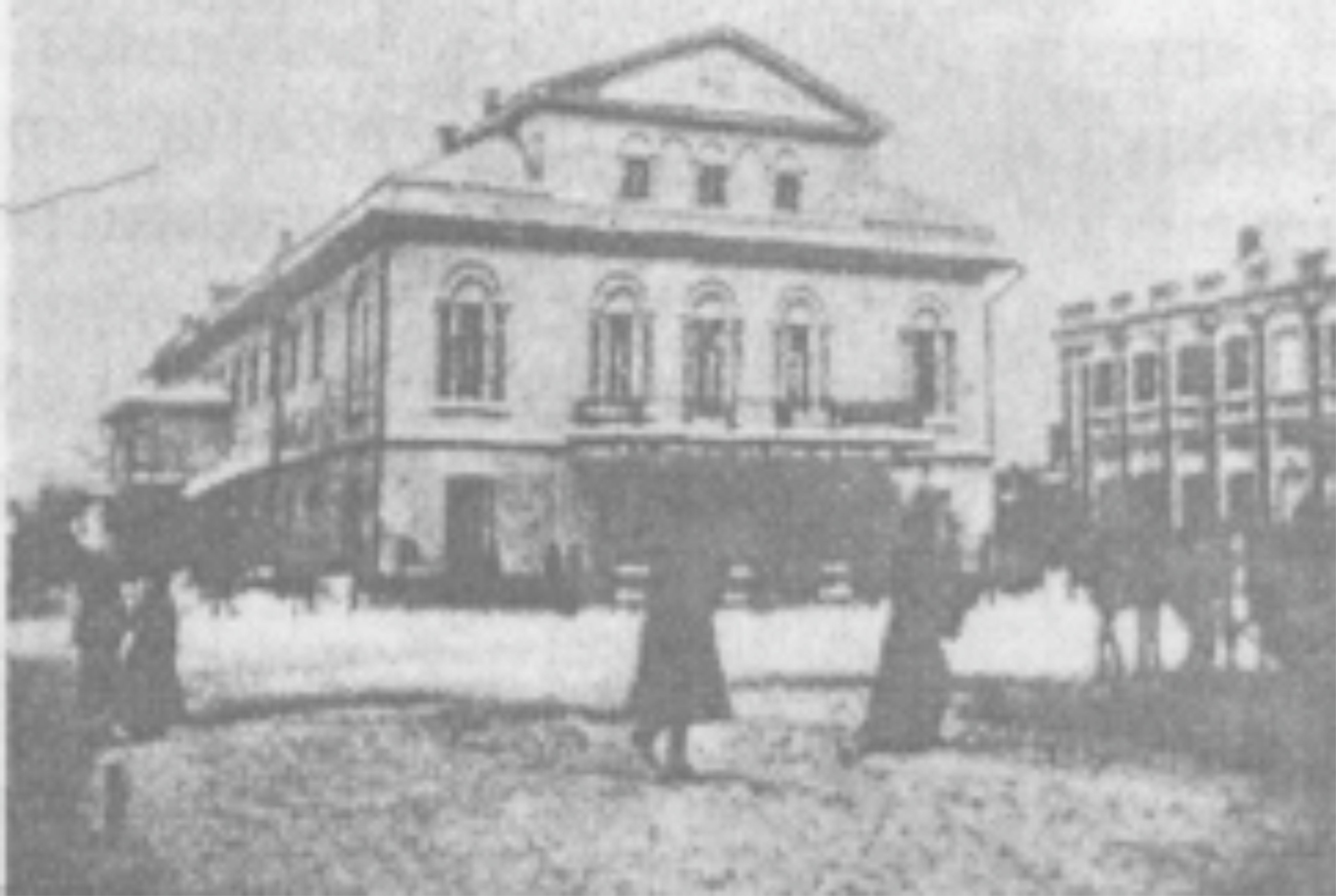 Здание театра, построенного Л. Ю. Млотковским в Харькове в 1841-1842 годах на западной стороне Дровяной площади (ныне Театральной). Позднее было перестроено его наследниками в здание, имеющее современный вид.